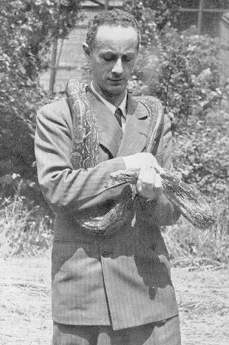 Zdeněk Vogel (1913-1986), český zoolog a spisovatel